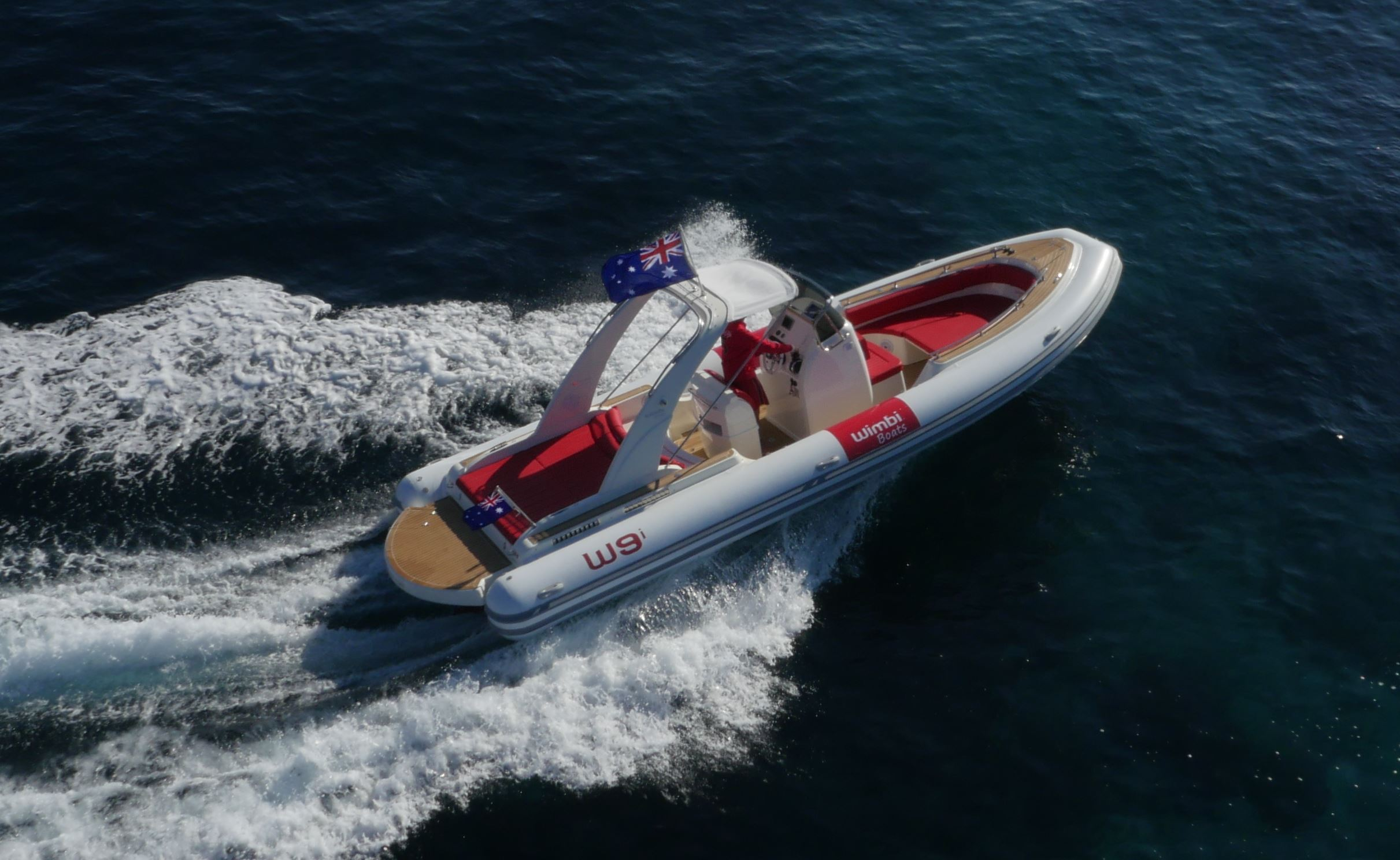 Prise de vue avec drone d'un bateau pneumatique semi rigide avec autorisation écrite de la marque Wimbi Boats pour sa diffusion libre de droits